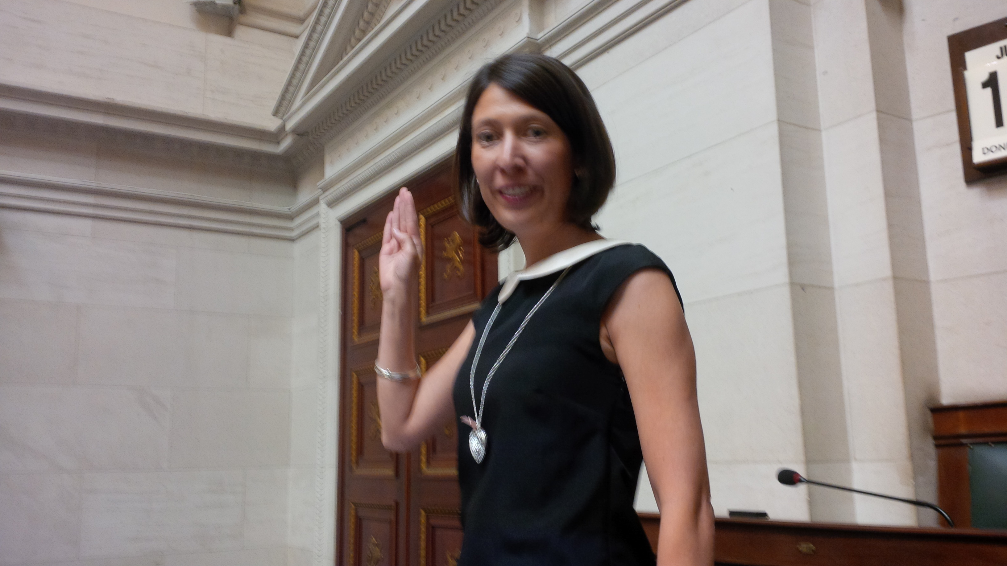 Prestation de serment le 19 juin 2014 à la Chambre des représentants comme députée fédérale.